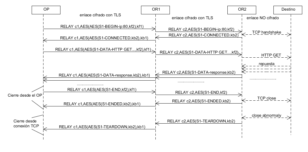 Envio info Tor